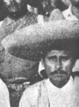 El general Crisoforo Ocampo